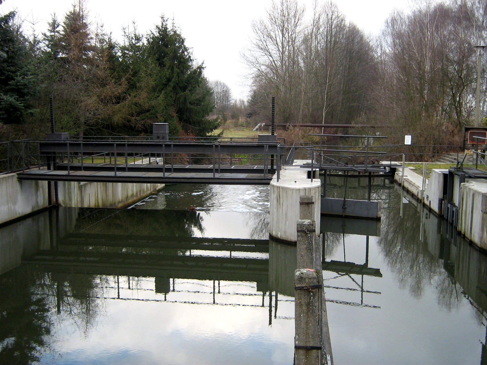 Schleuse an der „Groß Wasserburger Spree“ in Groß Wasserburg im Unterspreewald